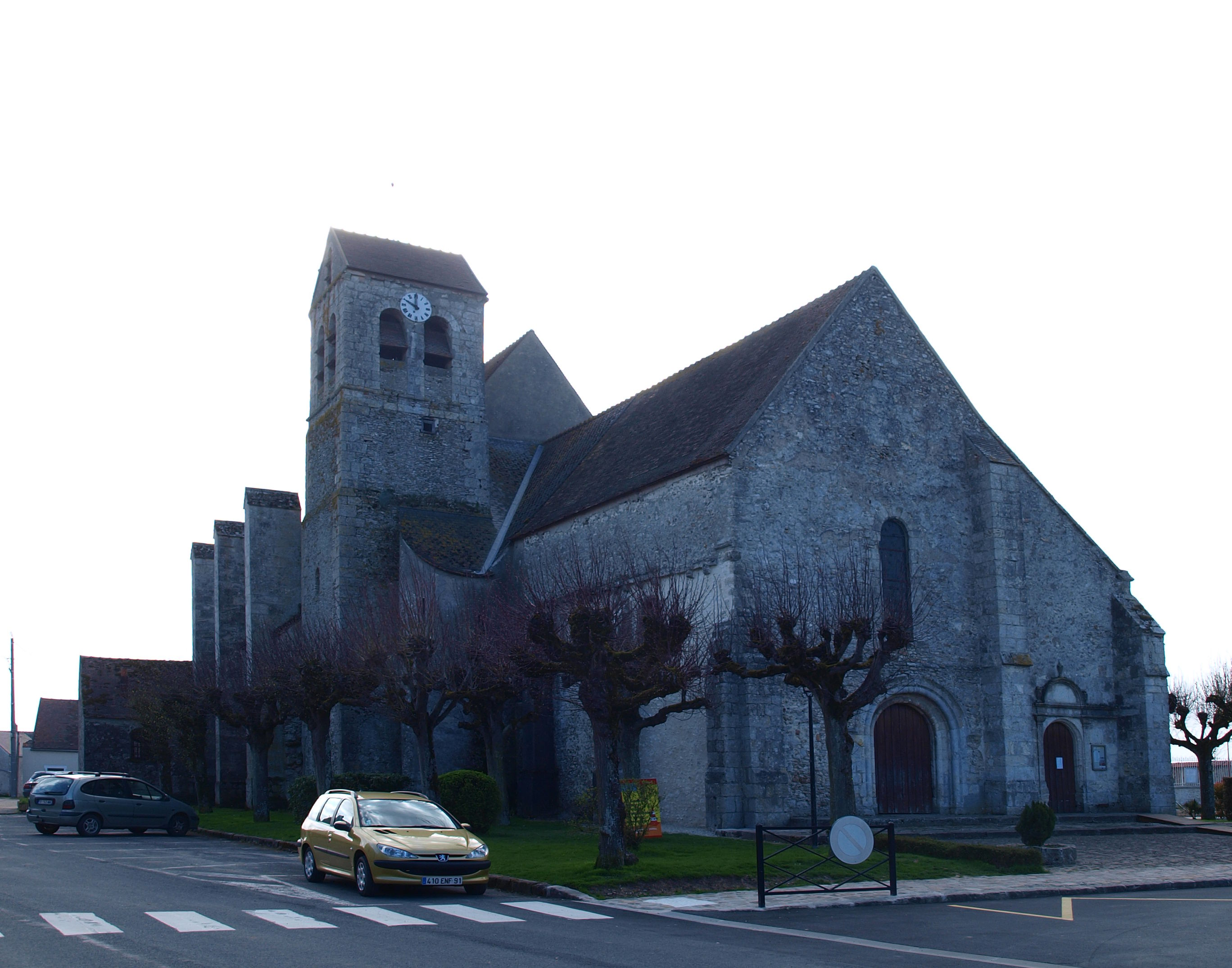 Authon-la-Plaine (Essonne, France) ; église.